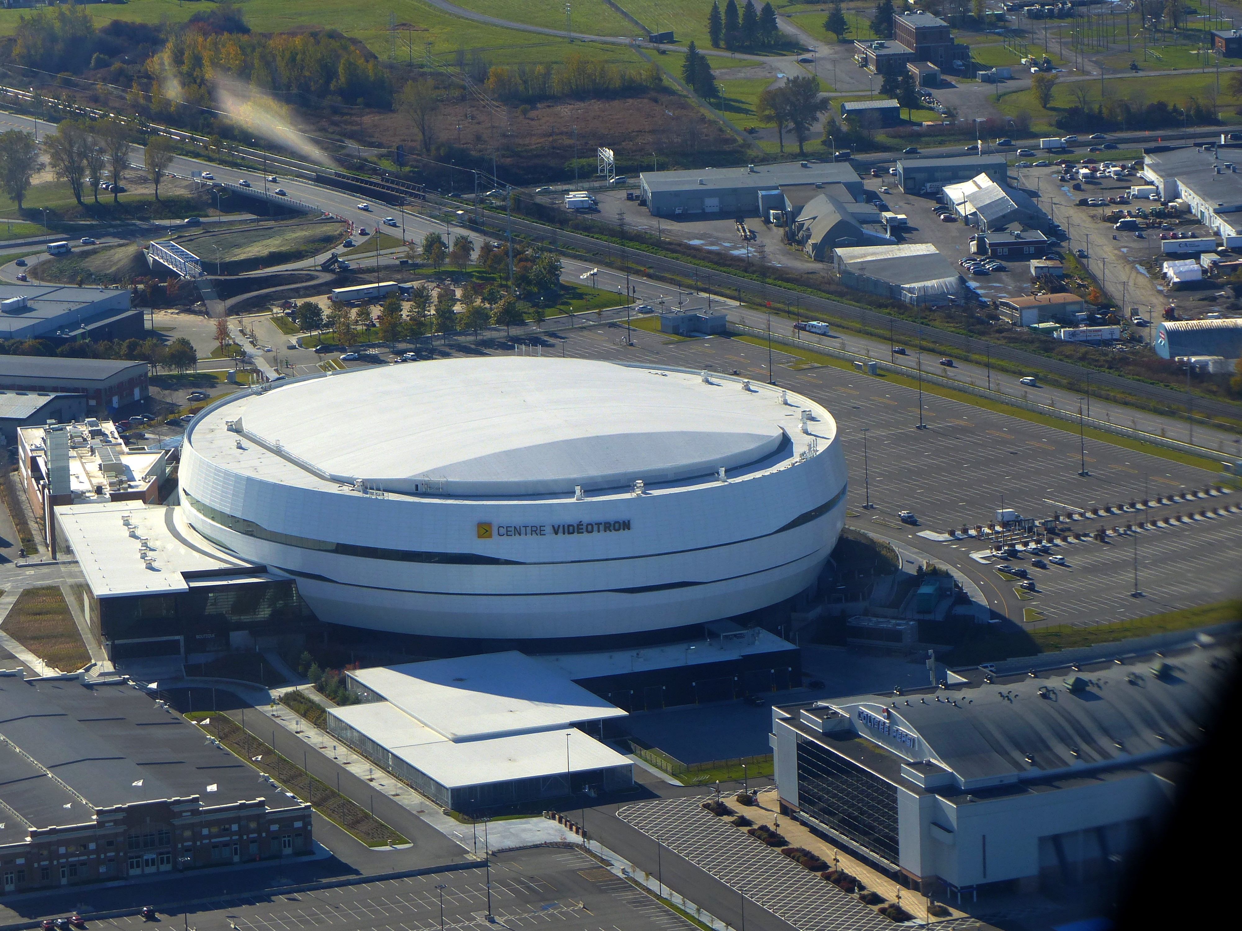 Québec City – Centre Vidéotron